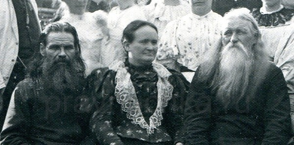 Слева направо: Василий Петрович Словцов, Екатерина Степановна Словцова со своим отцом Степаном Петровичем Поповым.